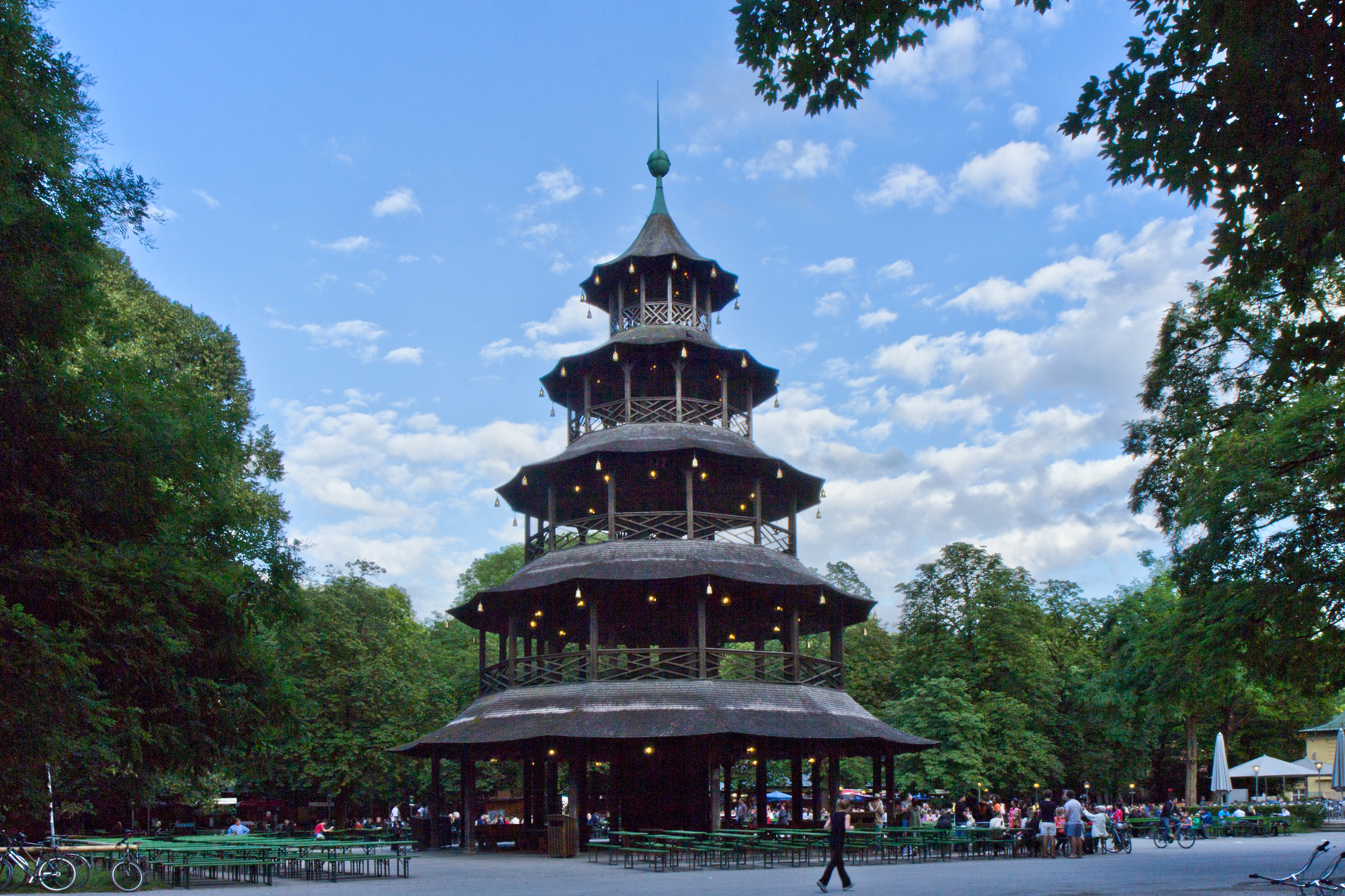 Wikipedia im Landtag – Bayern 17. bis 19. Juli 2012 in MünchenDieses Foto wurde im Rahmen des Projektes „Wikipedia im Landtag“ erstellt. Dieses Bild entstand anlässlich des Landtagsprojekts 2012 im Bayerischen Landtag. Der Chinesische Turm im Englischen Garten in München.